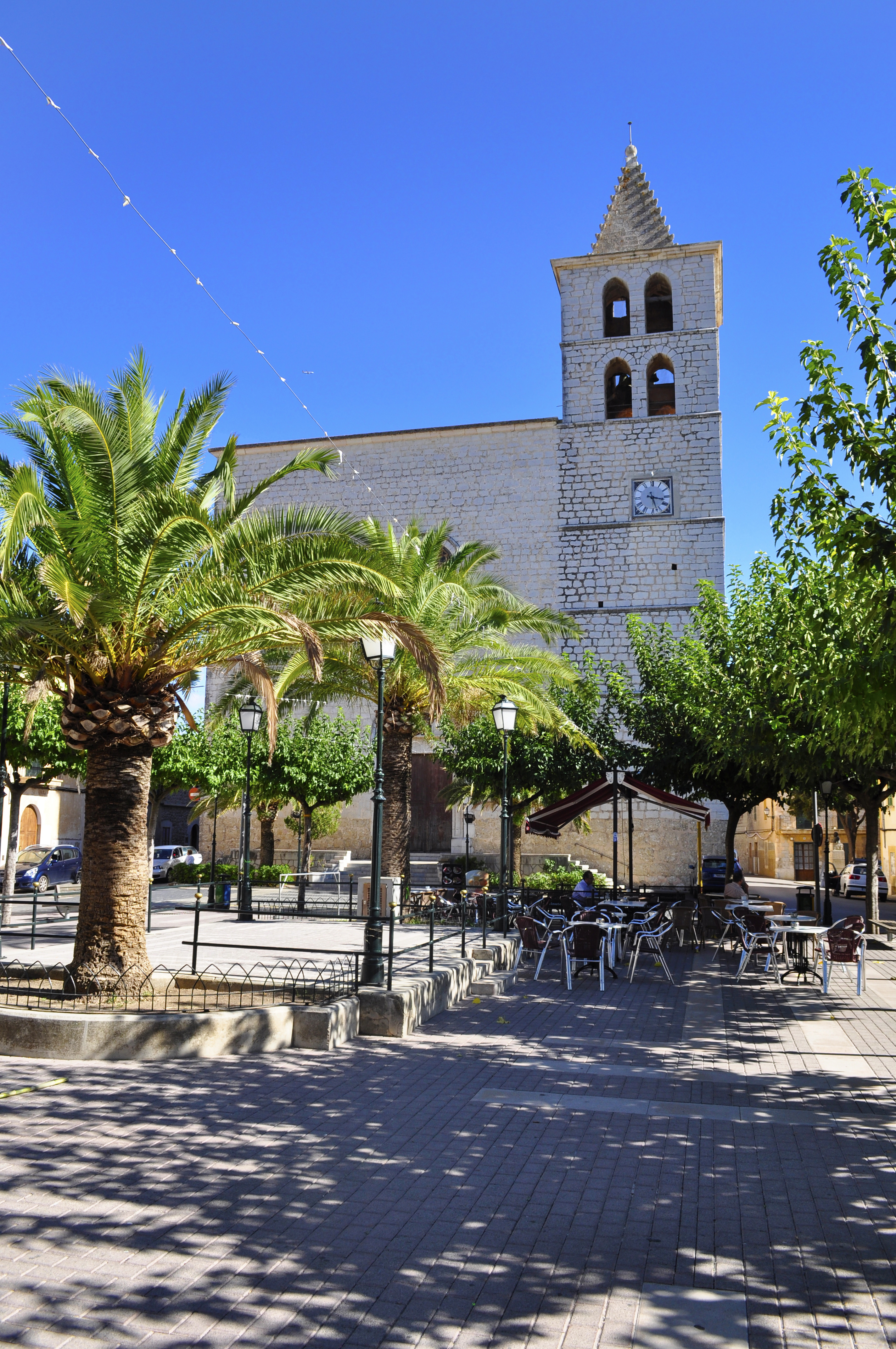 Iglesia Campanet, Islas Baleares, España